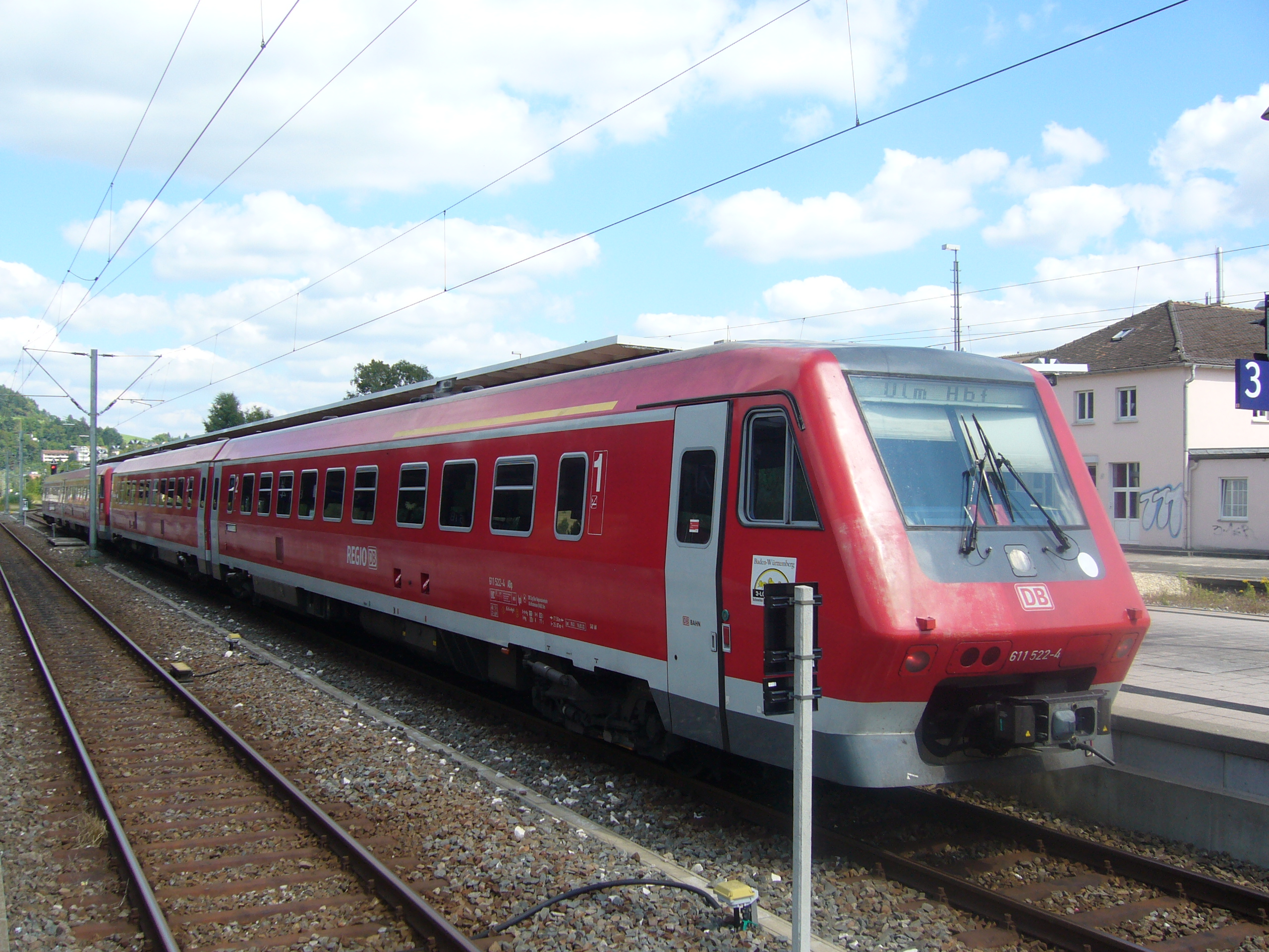 Regionalexpress der Baureihe 611 im Bahnhof Tuttlingen, RE Neustadt - Ulm (Donautalbahn)